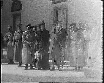 Кадър от филма Балканската война 1912-1913 - пристигането на цар Фердинанд и царица Елеонора на гара Караагач на 30 март 1913 г.